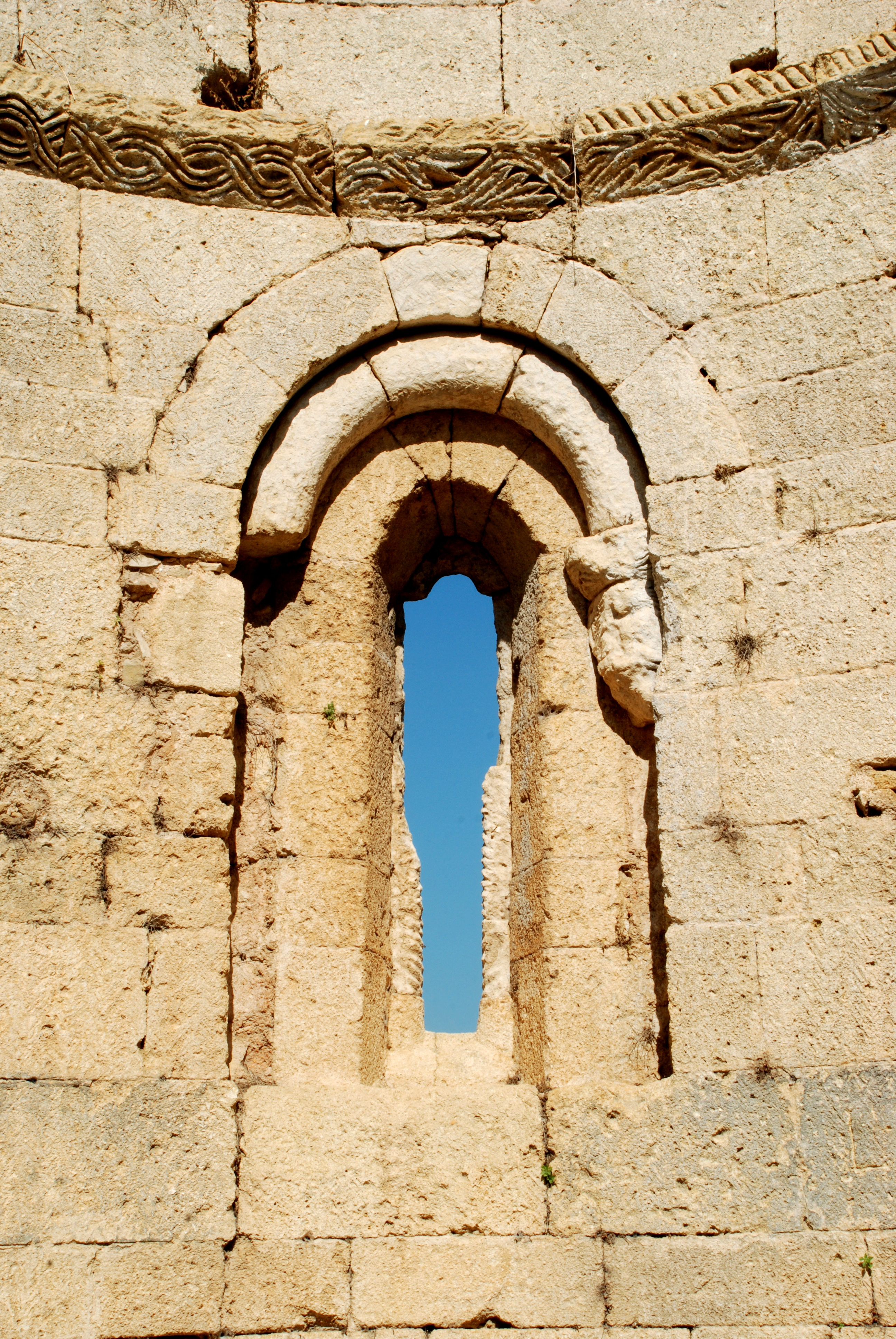 France - Gard - Église Saint-André de Souvignargues - fenêtre absidiale